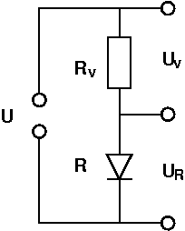 Zeichnung zur Schaltung eines Vorwiderstands